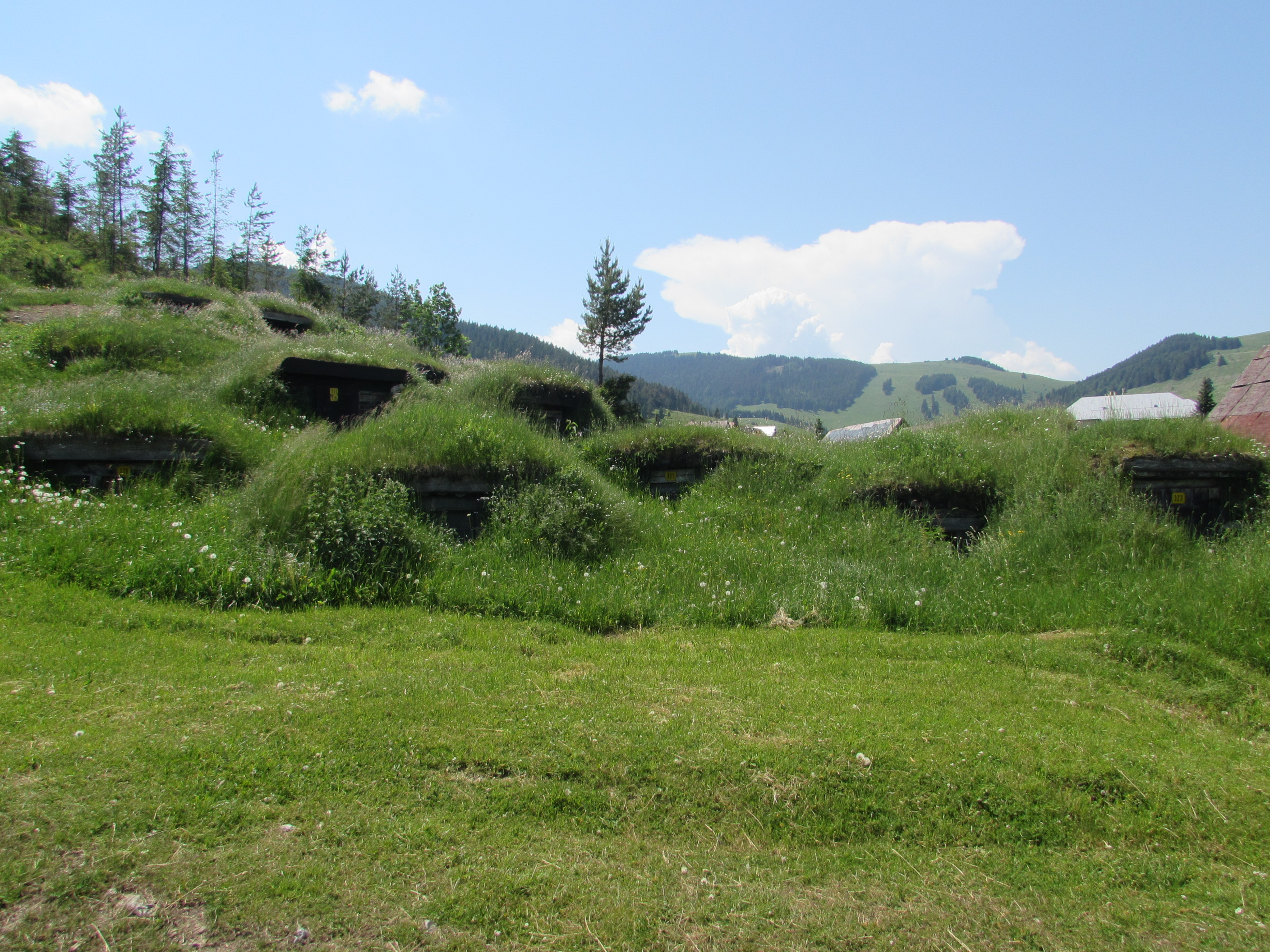 Kartoffelkeller Liptovská Teplička